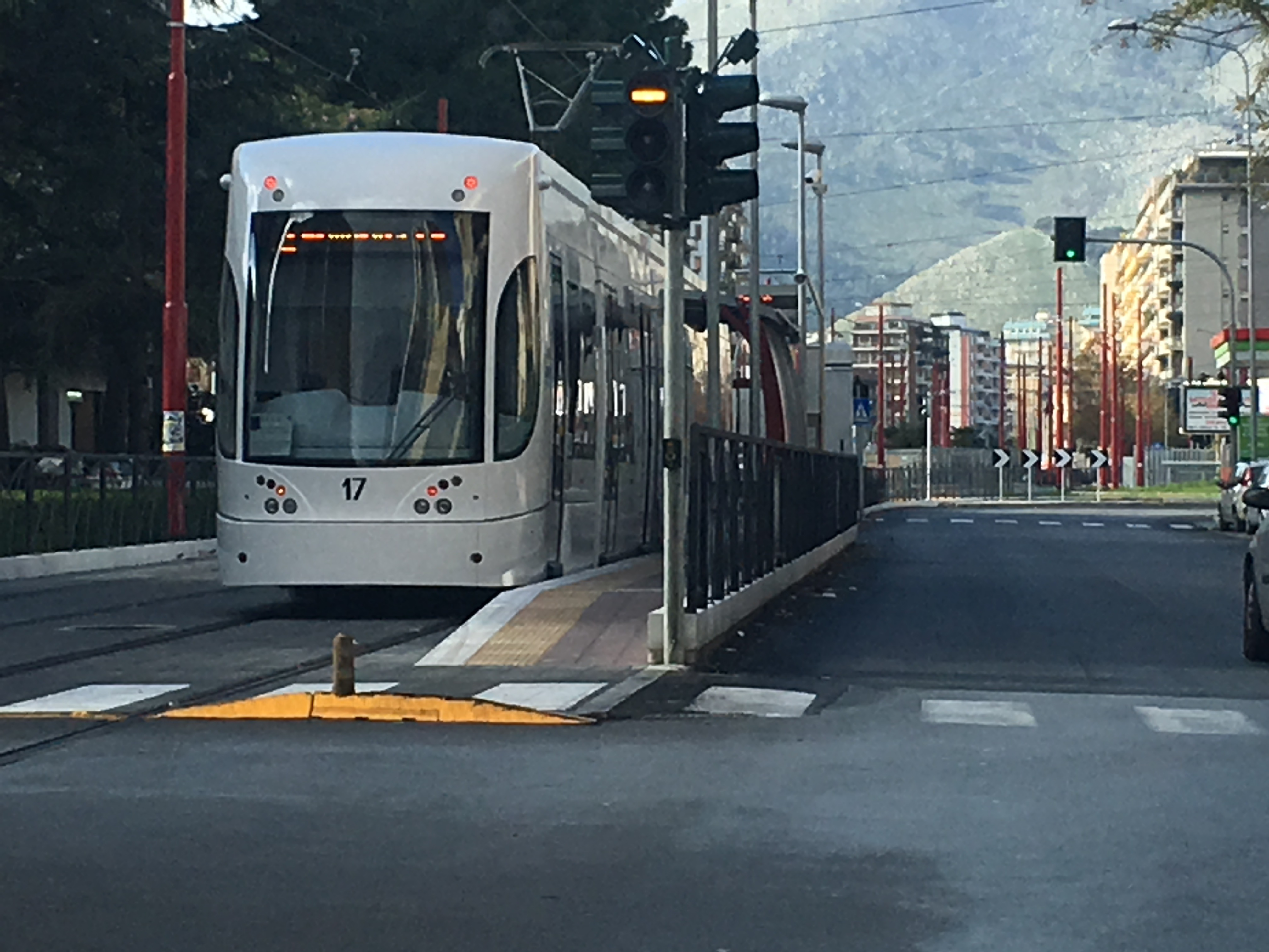 Una delle prime corse della rete tranviaria di Palermo: il tram in servizio in via Leonardo da Vinci